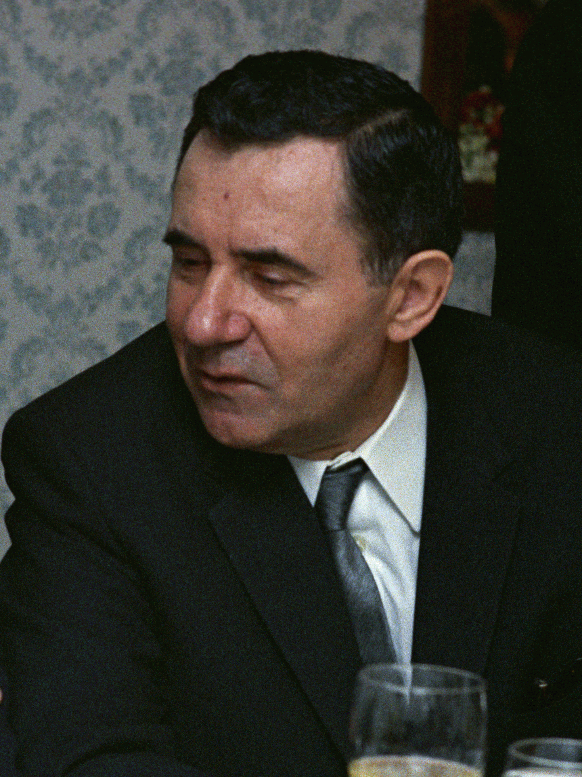 Andrei Gromyko (Андрей Андреевич Громыко), Foreign Minister of USSR